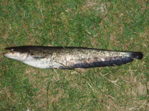 Description : Ablette Auteur : Utilisateur:Toorop Lieu : France Date : Août 2004 Copyright : GFDL